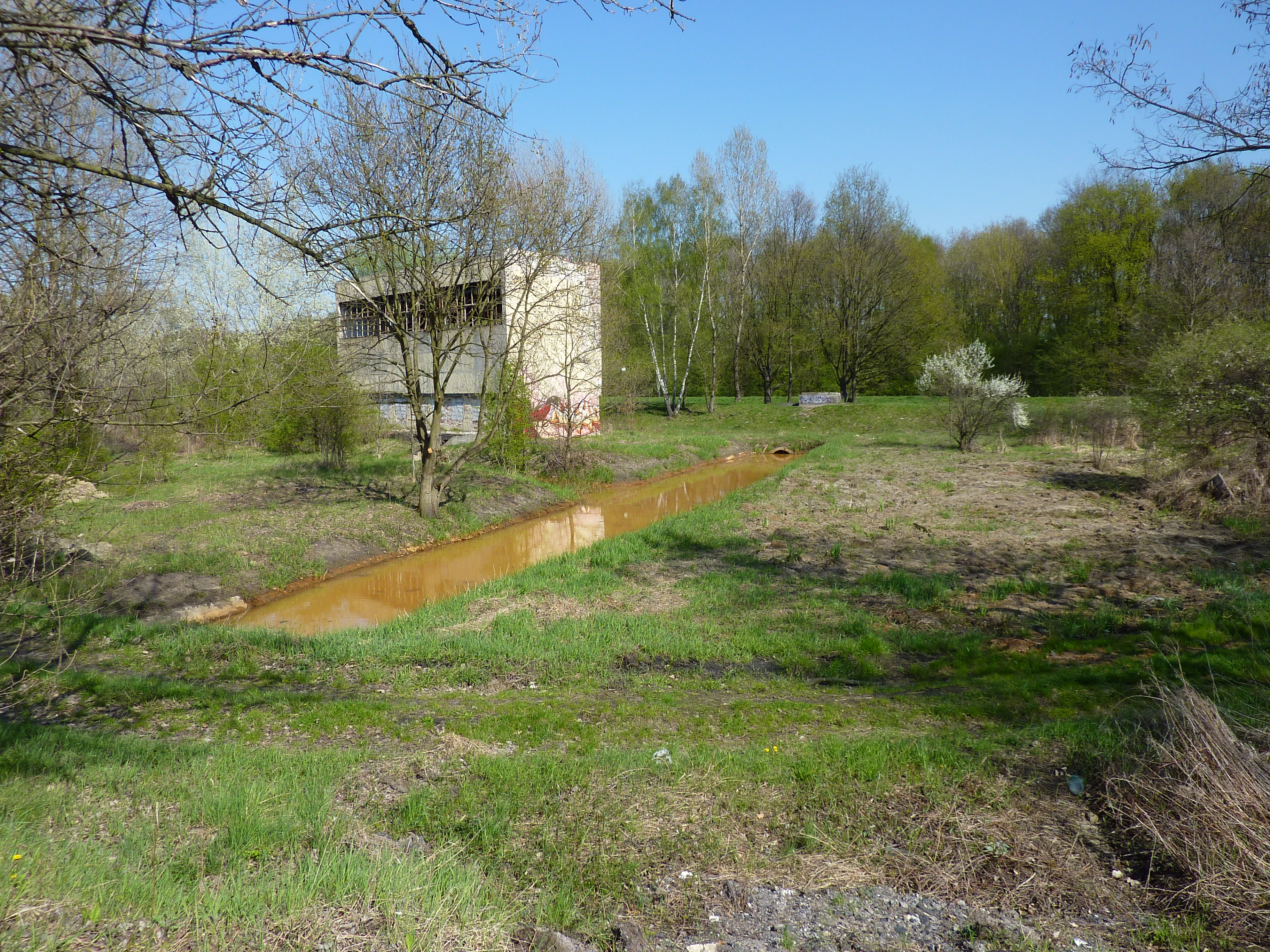 Strumień Piaskówka we Wrocławiu przy ujściu